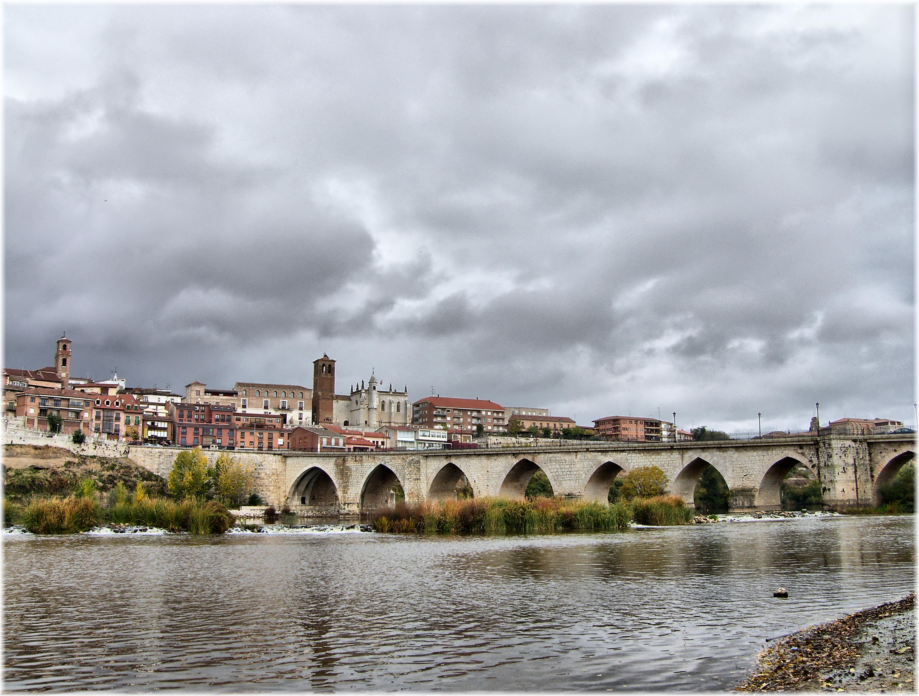 El río Duero a su paso por Tordesillas (Valladolid).